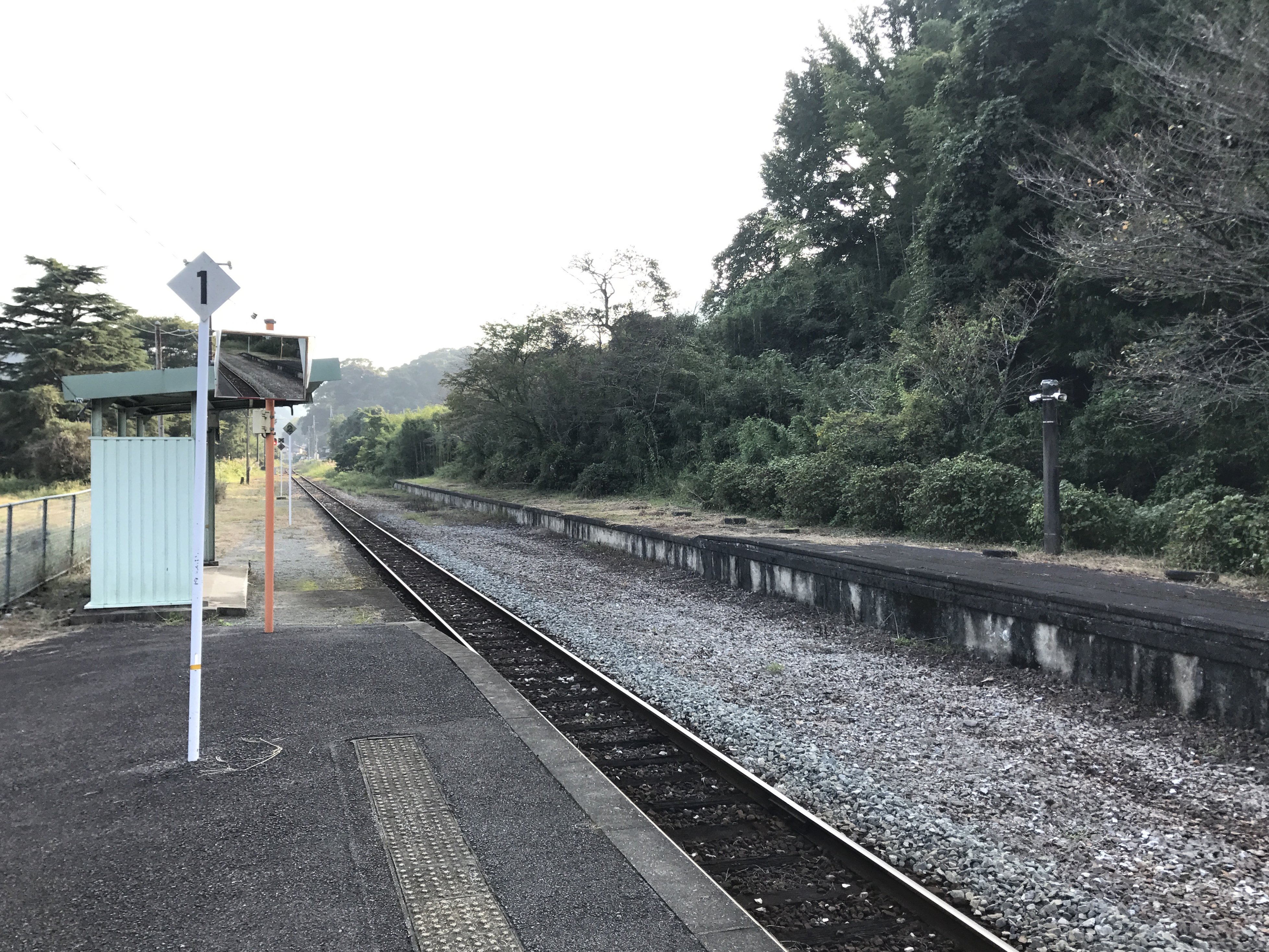 筑前内野駅のホーム(奥は筑前山家方面)